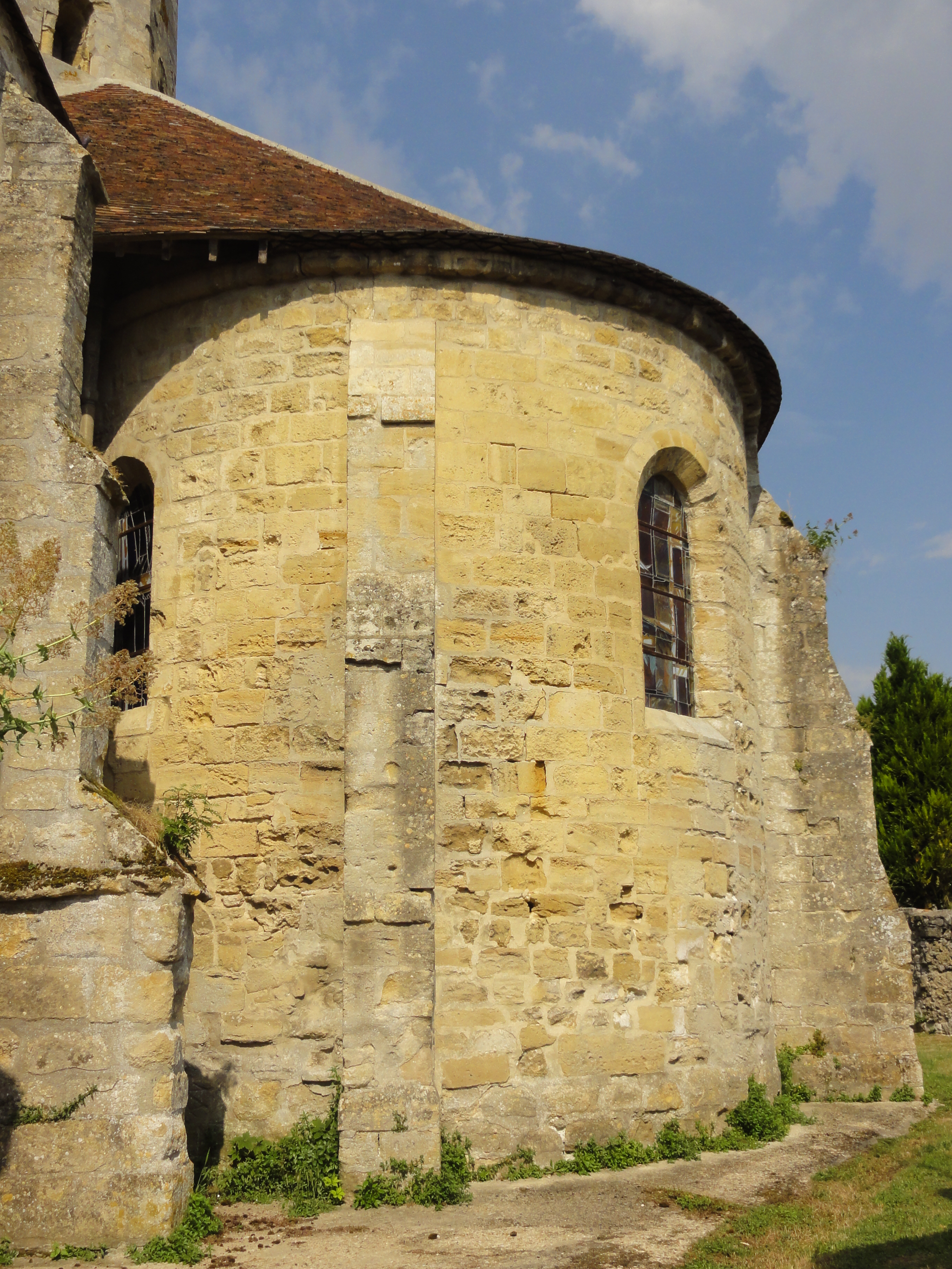 Église Saint-Pierre-ès-Liens de Condécourt (voir titre).